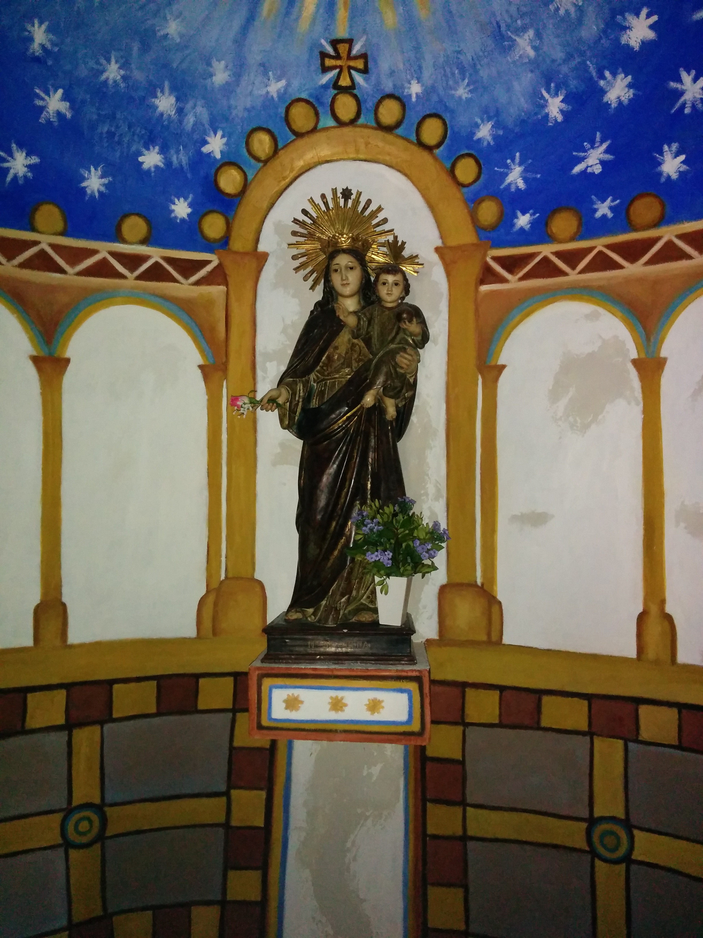 Església de Santa Maria d'Elena (Sant Aniol de Finestres)